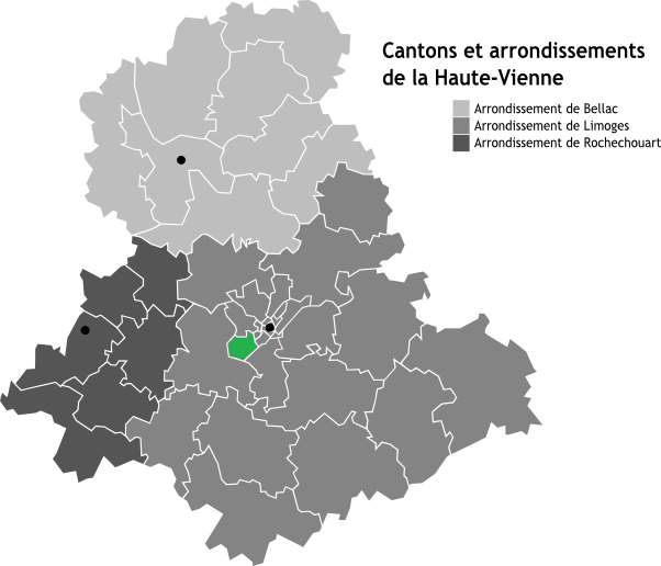 Canton de Limoges-Isle, Limousin, France en Carte des arrondissements de la Haute-Vienne